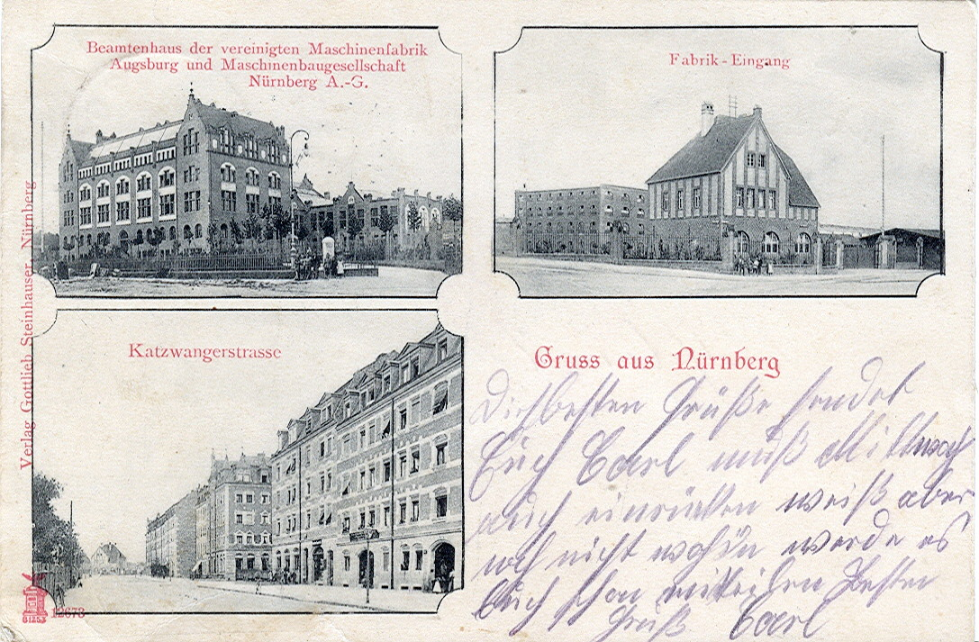 Postkarte, undatiert ( ca.1914 ). Beschriftung: "Gruss aus Nürnberg - Beamtenhaus der vereinigten Maschinenfabrik Augsburg und Maschinenbaugesellschaft Nürnberg AG - Fabrkeingang - Katzwangerstrasse".